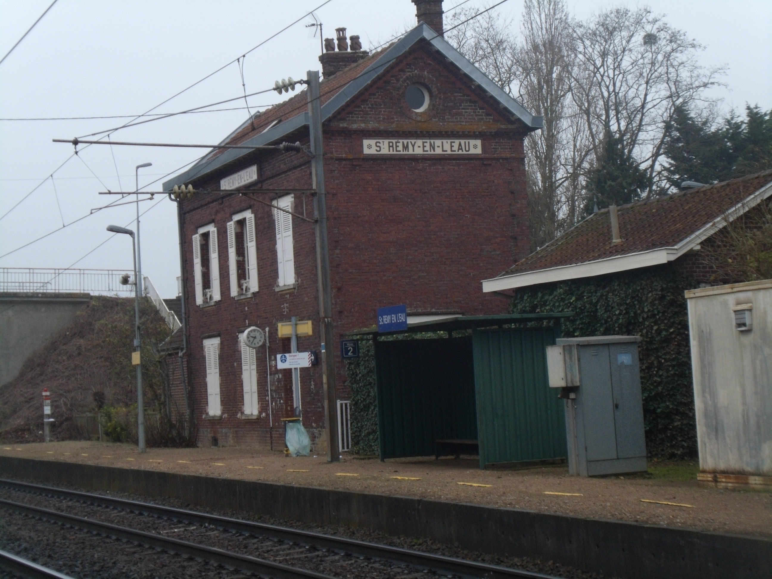 le bâtiment voyageurs